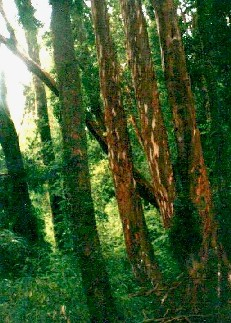 Roberto Bahamonde, 19/12/2003